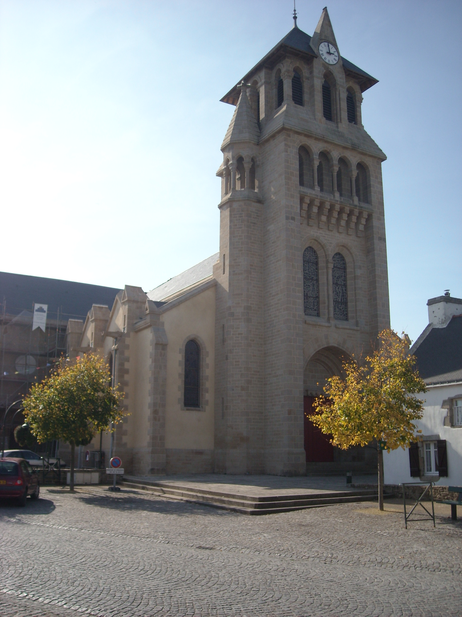 Photo de l'église de Séné depuis la place du village.